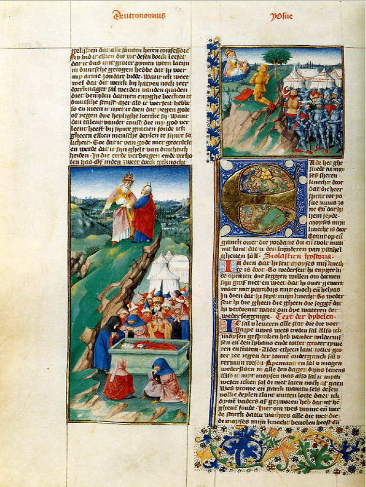 Miniaturen van de zgn. Meester van Evert Zoudenbalch in de Zoudenbalchbijbel (Wenen, Österreichische Nationalbibliothek, cod. 2771, 2772).